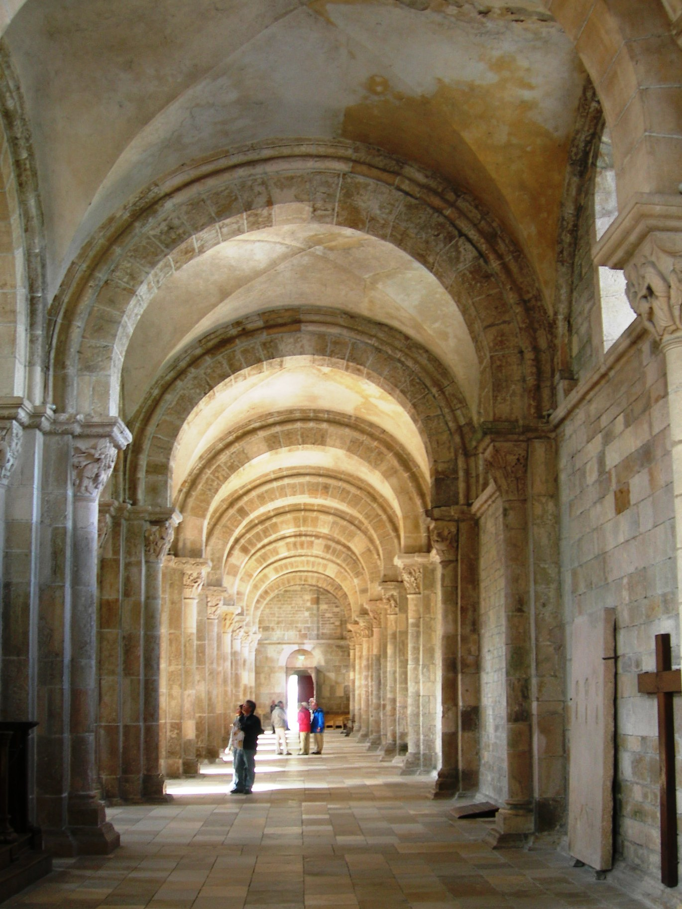 Ste Madeleine, north aisle